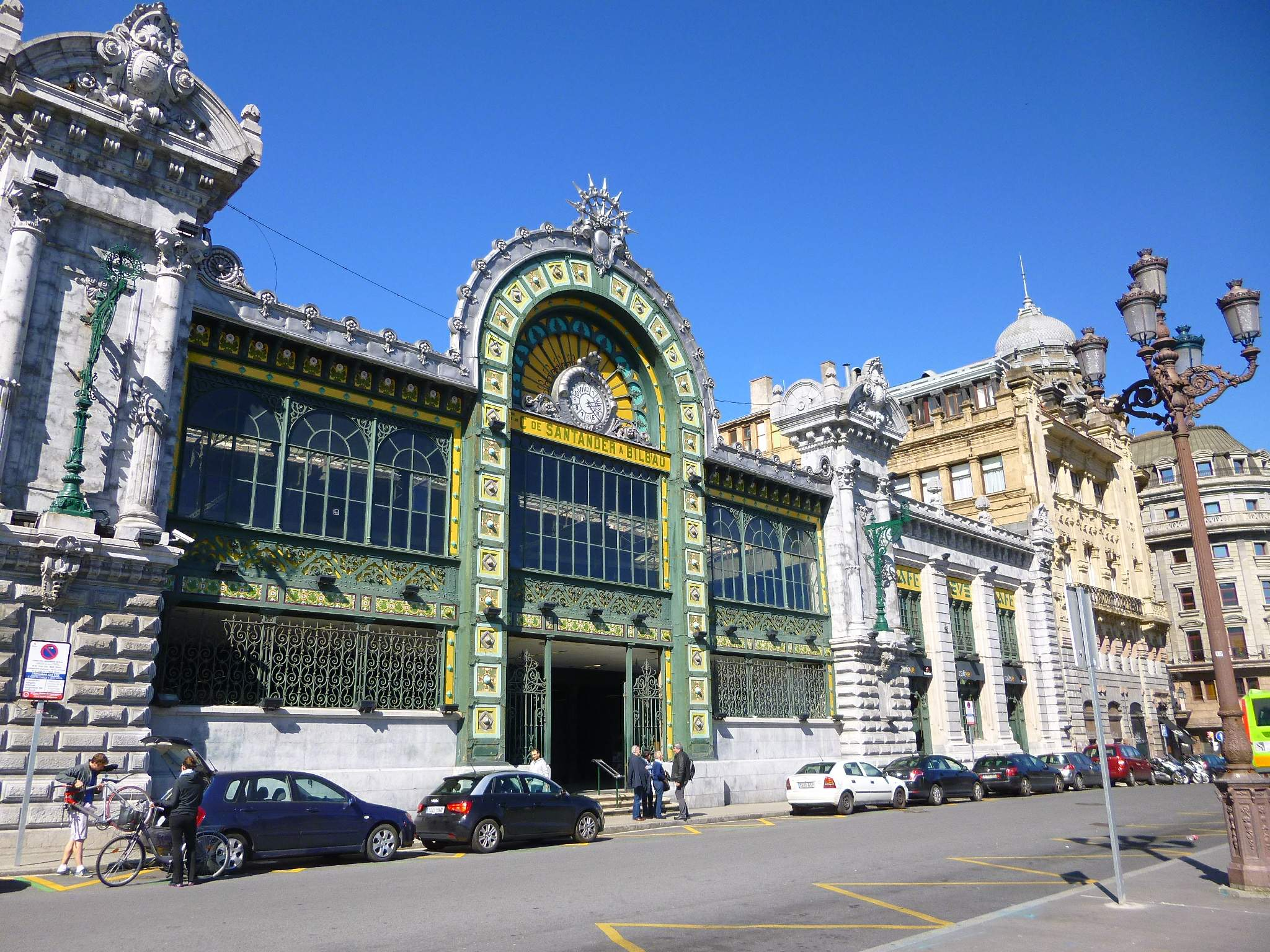 Estacion de FEVE Concordia, en Bilbao